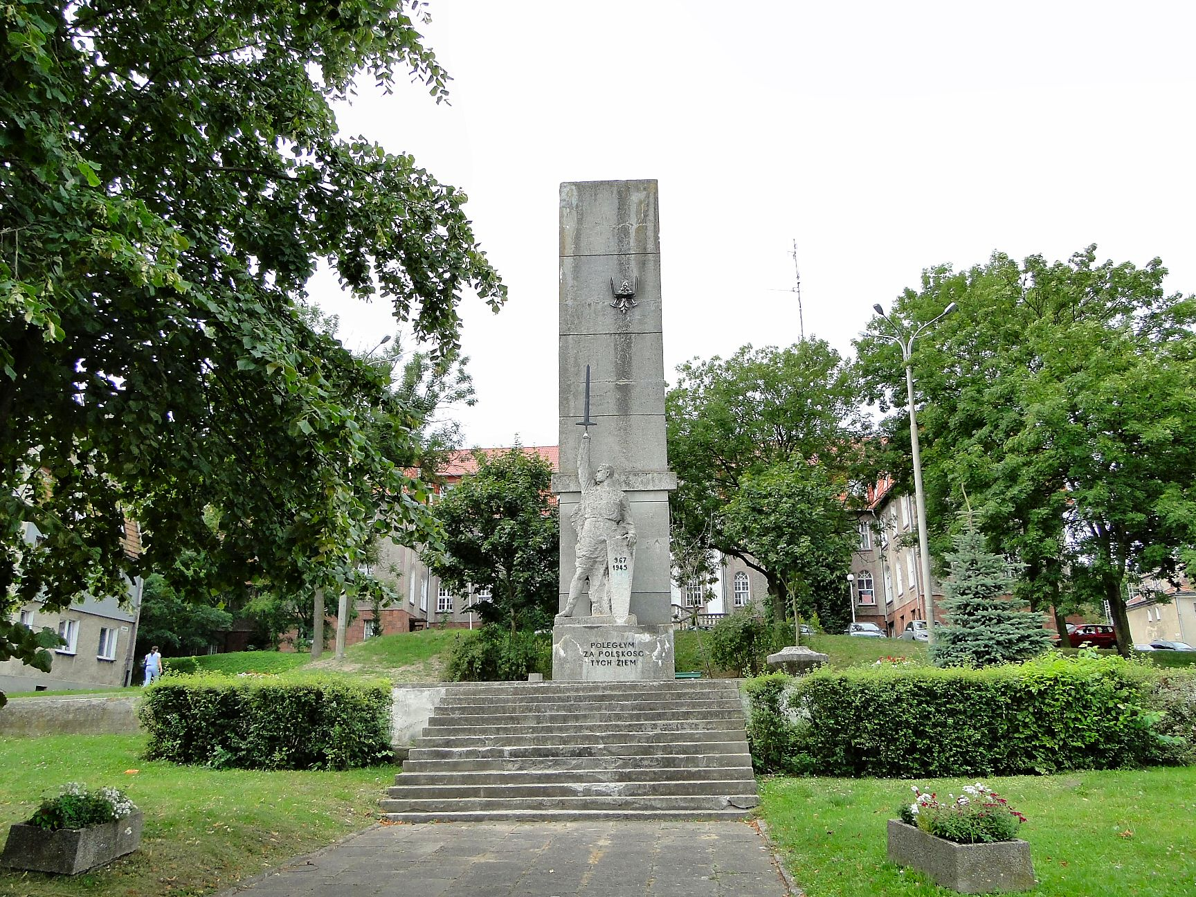 Pomnik Poległych za Polskość Tych Ziem w Kamieniu Pomorskim